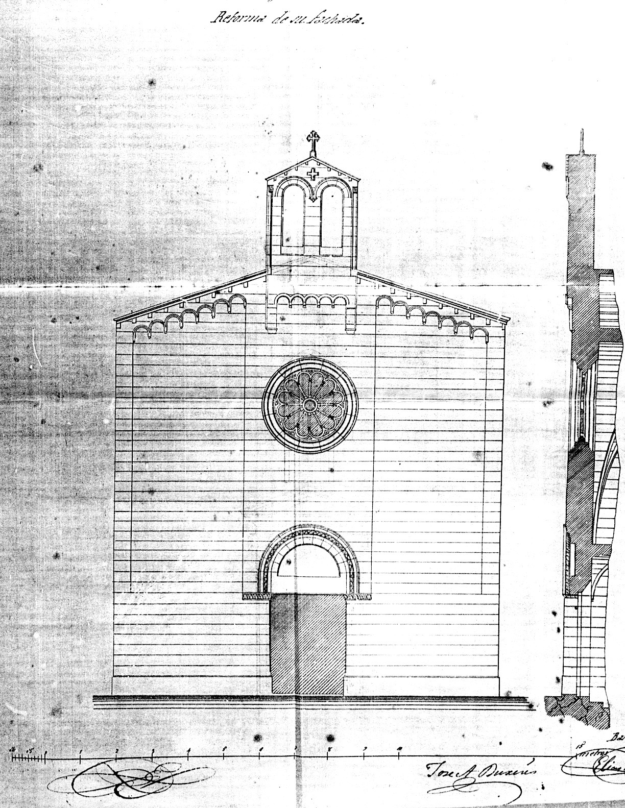 Barcelona, façana actual de la capella templera de Palau. Projecte d'Elies Rogent, 1866. (Arxiu Administratiu de la Ciutat).